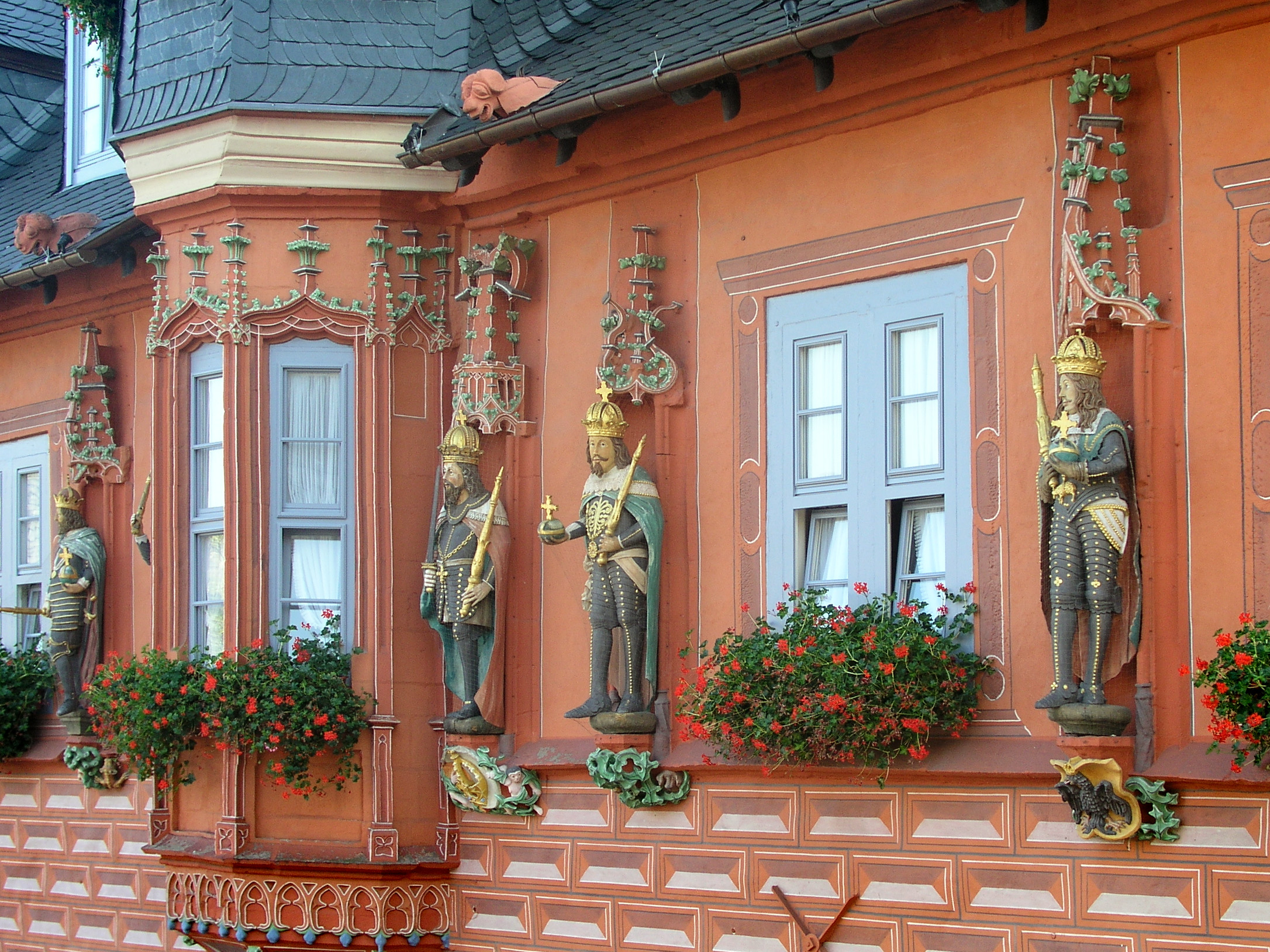 Goslar , Kaiserworth, Kaiserskulpturen, Foto 2005